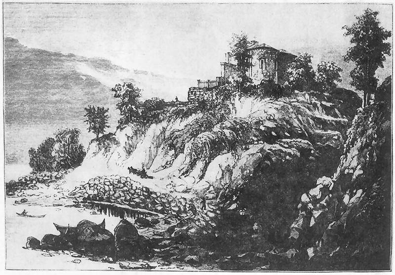 Michał Elwiro Andriolli